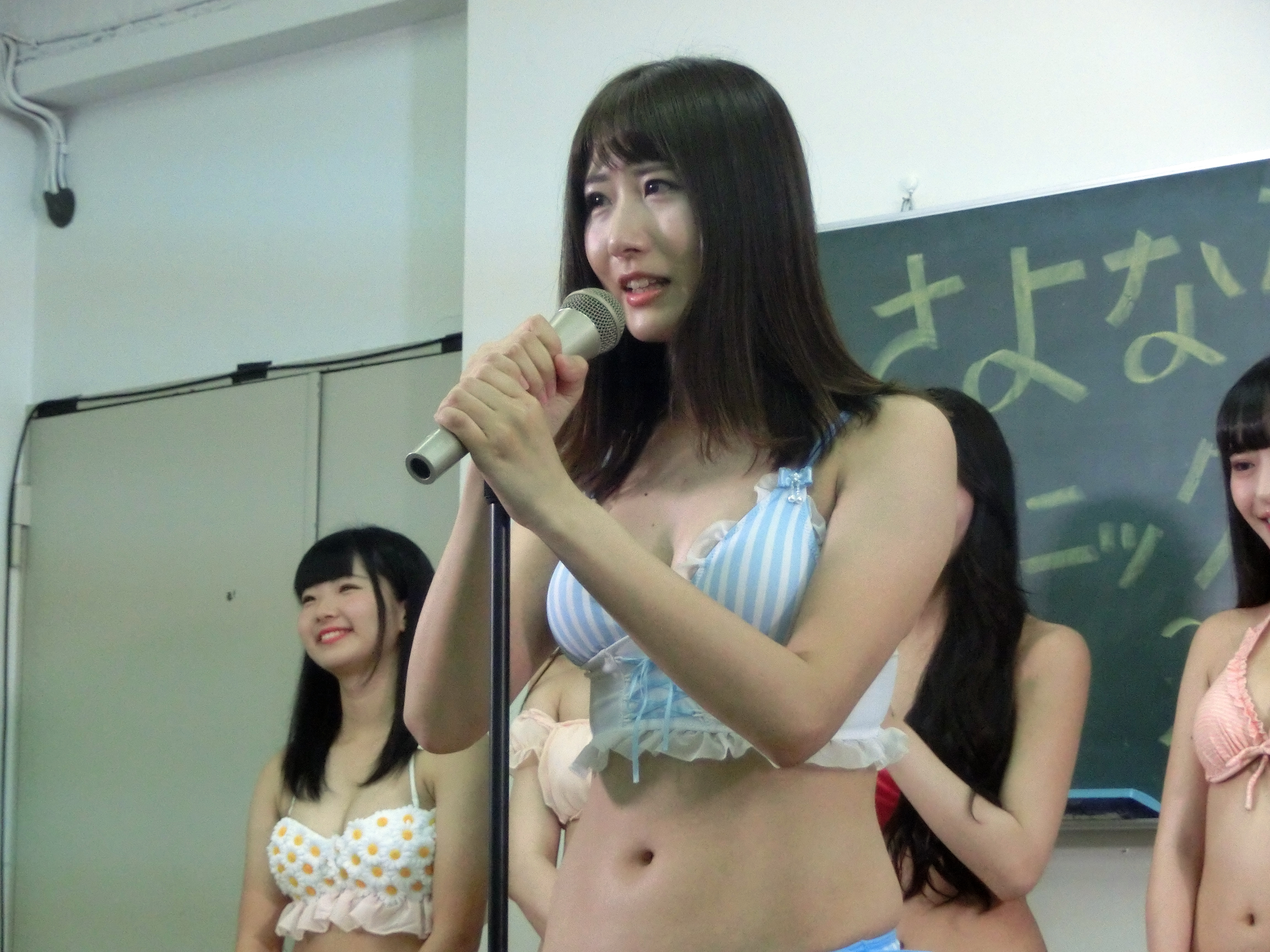 Miss genic 2019